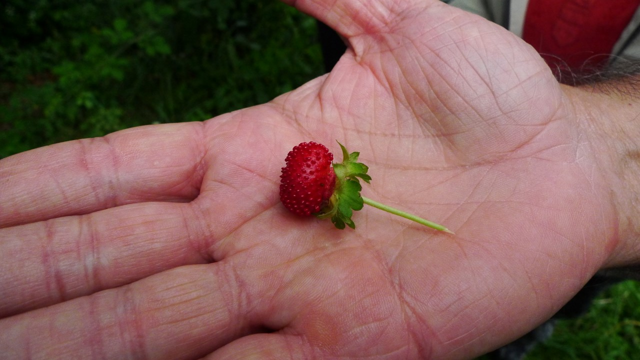 Dukesnea bero